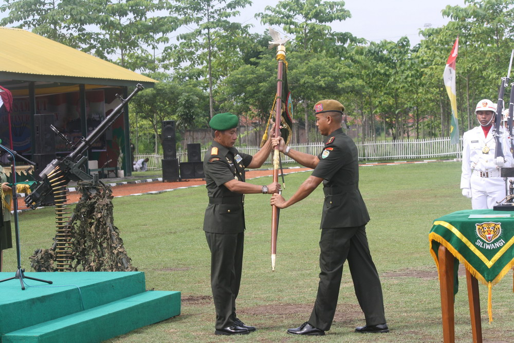 Sertijab Danyon Arhanudse-14 Serah terima jabatan Komandan Batalyon Arhanud Sedang-14 Kodam III/ Siliwangi dari Letkol Arh Tri Sugiyanto SSos kepada Mayor Arh Sudrajat SH, dilaksanakan di Lapangan Markas Yonarhanudse-14 Jl Raya Pilang, Cirebon ( 4/12 /2013 ) melalui sebuah upacara Militer. Kegiatan tersebut di pimpin Pangdam III/ Slw Mayjen TNI Dedi Kusnadi Thamim, dengan di hadiri unsure Pejabat Muspida Kota/Kab Cirebon, Para Pejabat Militer dan Undangan lainnya. Letkol Arh Tri Sugiyanto, Alumni Akmil 1996 ini selanjutnya menjabat Dandim Kab Bandung, Kab Bandung Barat dan Kota Cimahi.